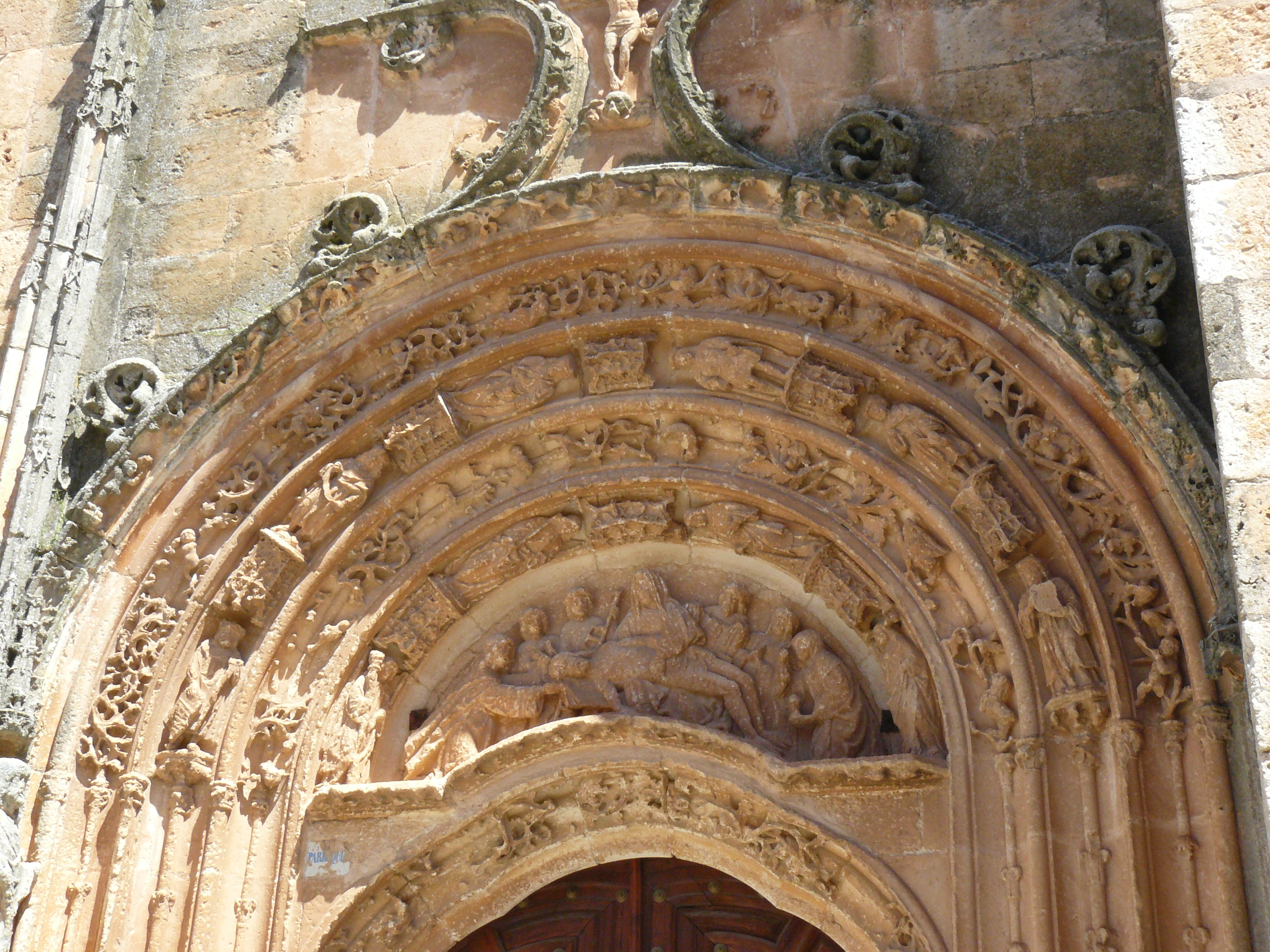 Iglesia de la Asunción de NUesrta Señora, Villahoz, Burgos.